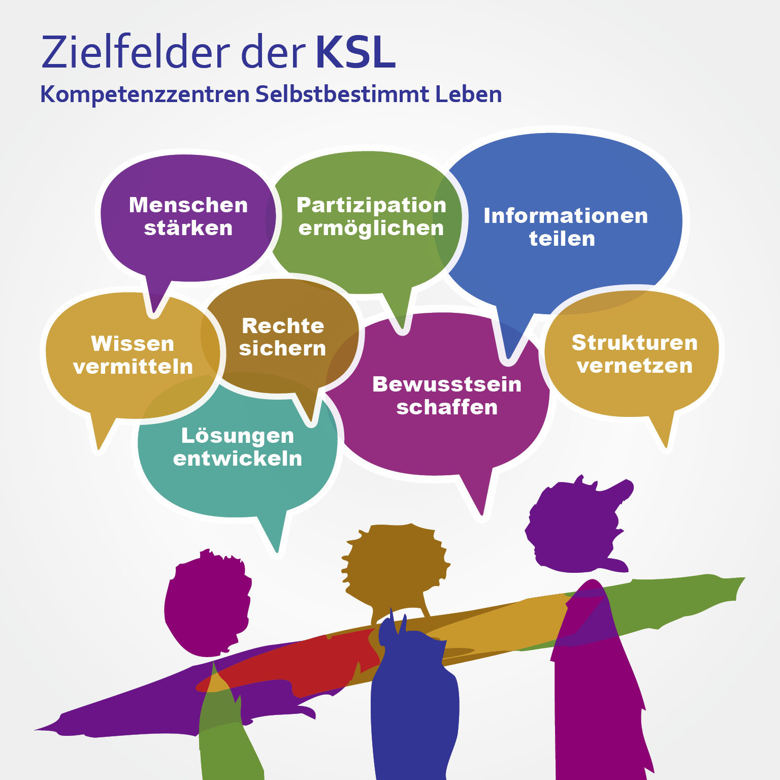 Ziele der KSL